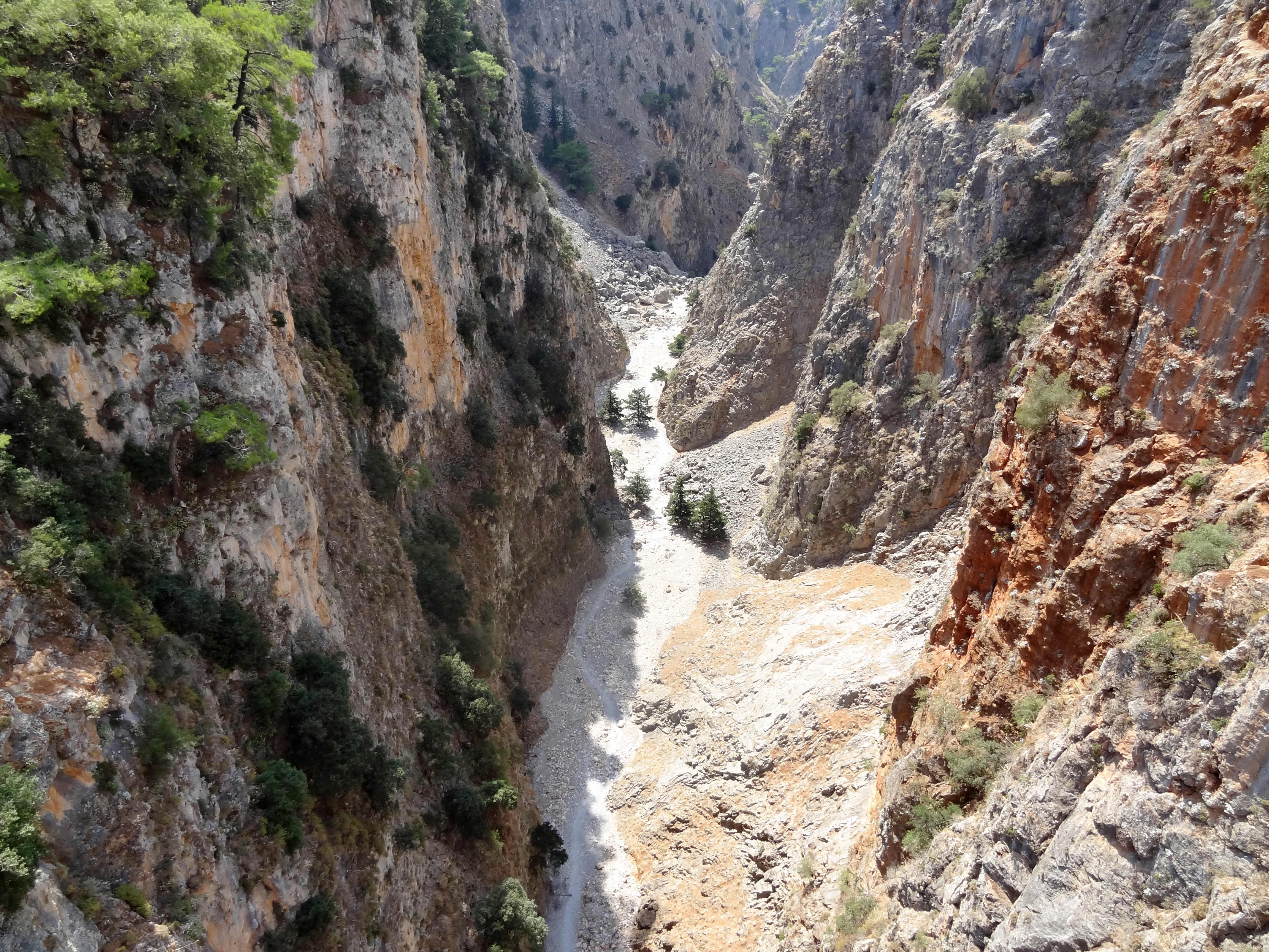 Aradena-Schlucht, Gemeinde Sfakia, Regionalbezirk Chania, Kreta, Griechenland